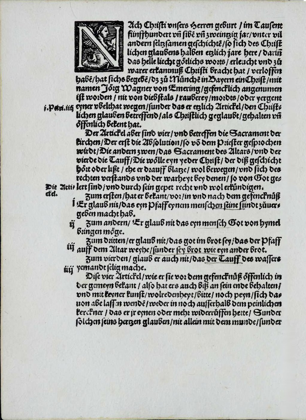 Erste Seite einer zeitgenössischen Schrift über den Prediger Georg Wagner, der 1527 im katholischen München wegen Häresie hingerichtet wurde, erschienen noch im gleichen Jahr im – protestantischen – Nürnberg. Titel: Ein new warhafftig und wunderbarlich geschicht oder hystori von Jörgen wagner zu München in Bayern eyn Ketzer verbrandt im Jar M.D.xxvij